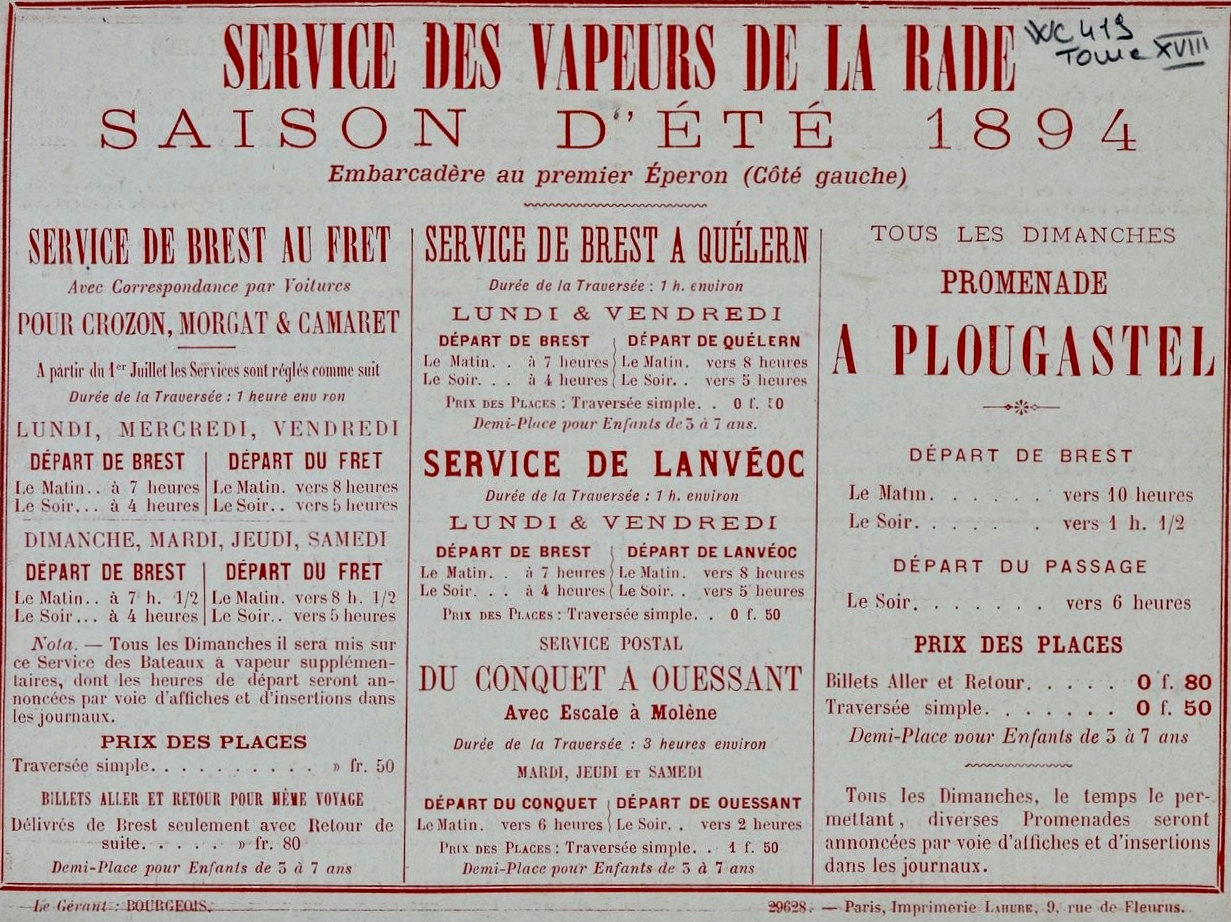 Le programme des promenades maritimes en Rade de Brest pour l'année 1894 (photographie de A. Karl, 1894).